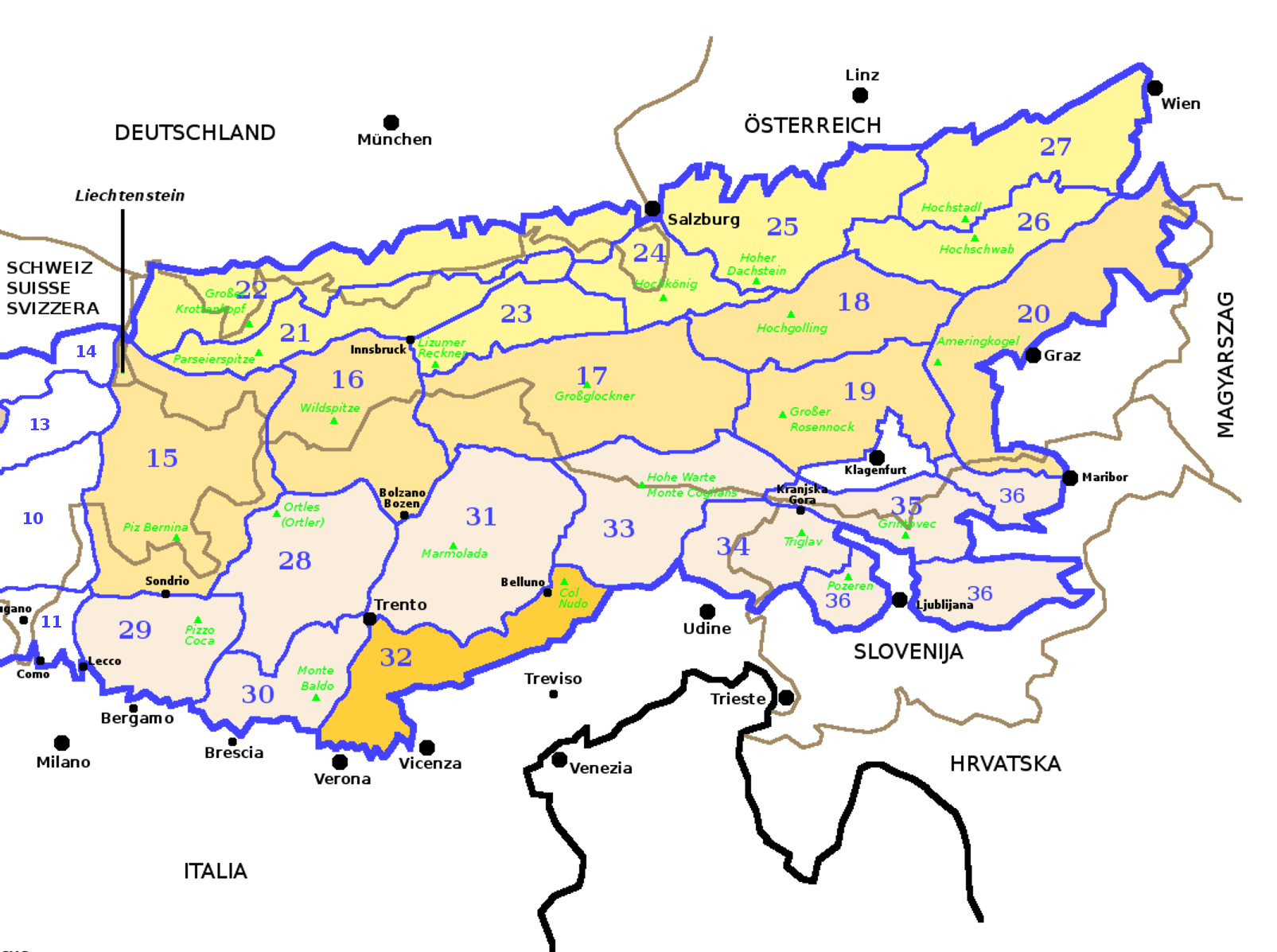 Alpi Orientali secondo la SOIUSA con evidenziate le Prealpi Venete